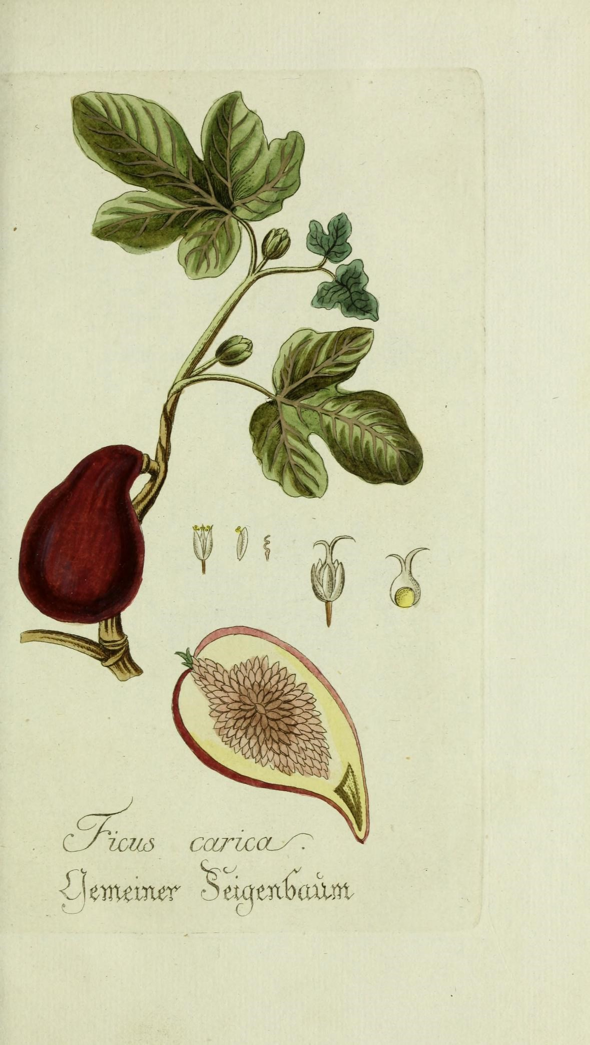 Plantarum indigenarum et exoticarum icones ad vivum coloratae, oder, Sammlung nach der Natur gemalter Abbildungen inn- und ausländlischer Pflanzen, für Liebhaber und Beflissene der Botanik /